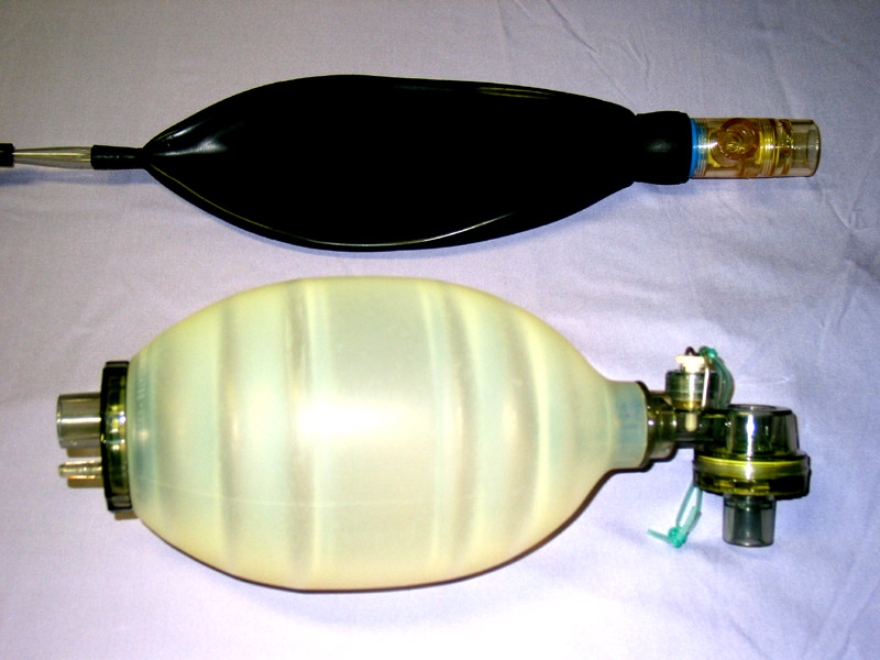 ballon d'anesthésie et ballon auto insufflateur